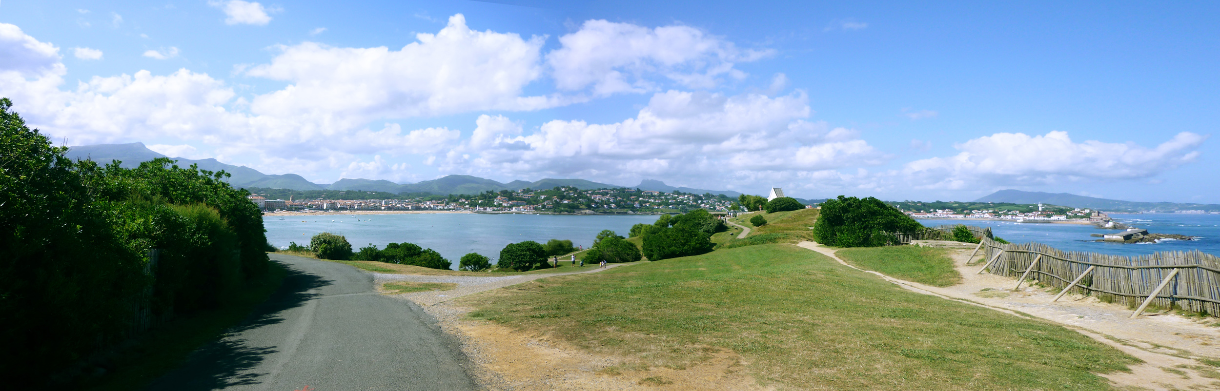 Colline Sainte Barbe à Saint jean de luz - en second plan de gauche à droite saint jean de luz, Ciboure et Socoa